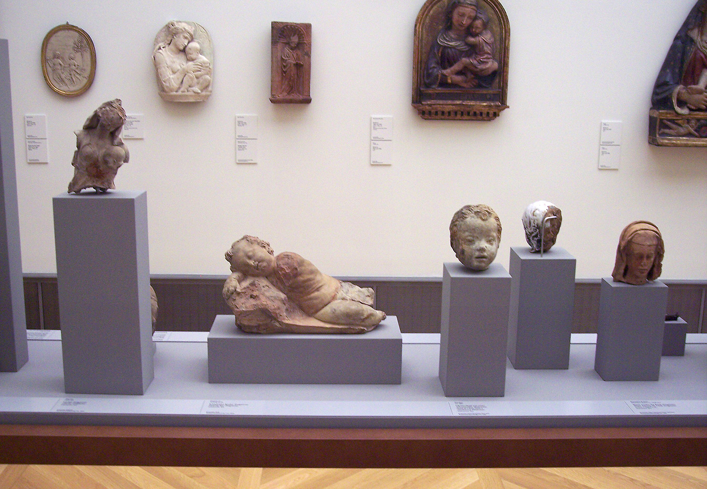 Bode Museum Native nameBode-MuseumParent institutionBerlin State MuseumsLocationBerlinCoordinates52° 31′ 19″ N, 13° 23′ 41″ E Established1904Web page control : Q157825 VIAF: 104146937731213830769 ISNI: 0000 0001 2348 0535 LCCN: nr2007002827 OSM: 2186879 GND: 5044715-4 WorldCat institution QS:P195,Q157825 Studiensaal Italienische Skulpturen (Vitrine mit im Zweiten Weltkrieg stark beschädigten Skulpturen)